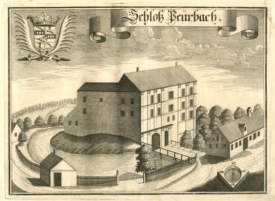 “Schloß Peürbach” (Bayerbach an der Rott), aus : Beschreibung des Churfürsten- u. Hertzogthumbs Ober- und Nidern Bayrn. Rentamt Landshut, 1723